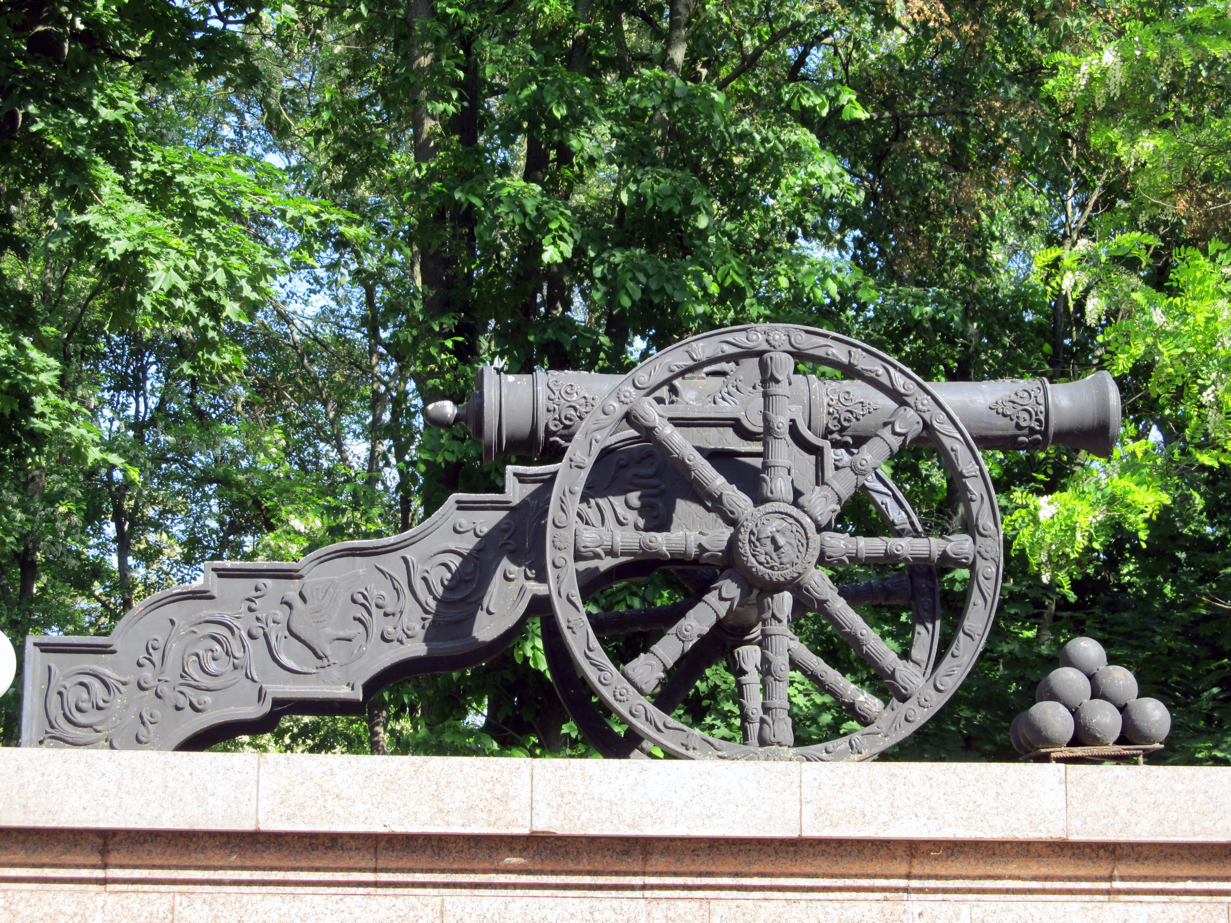 Беларуская (тарашкевіца): Палацава-паркавы ансамбаль: палац, дэкаратыўнае аздабленьне інтэр’ера вежы і цэнтральнай залі палаца, Петрапаўлаўскі сабор, капліца-пахавальня,парк. г. Гомель This is a photo of Belarusian heritage monument. Reference number: 310Г000044 ( WLM)